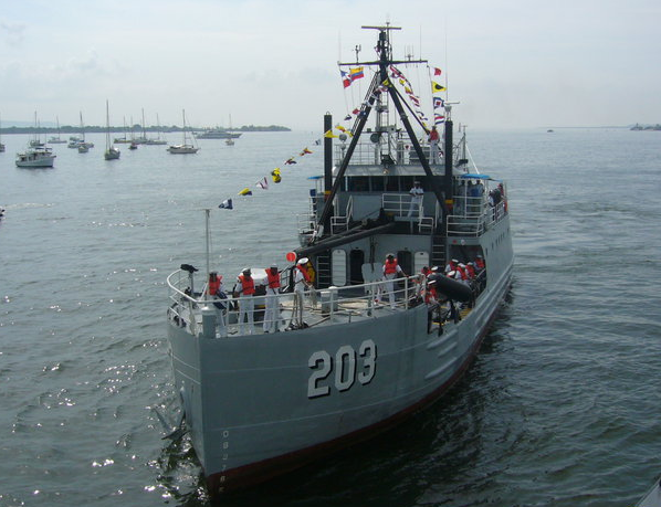 Foto del patrullero de la marina de guerra, Tortuguero P 203 para wikipedia Photo of the patrol ship tortuguero of the dominican navy for wikipedia